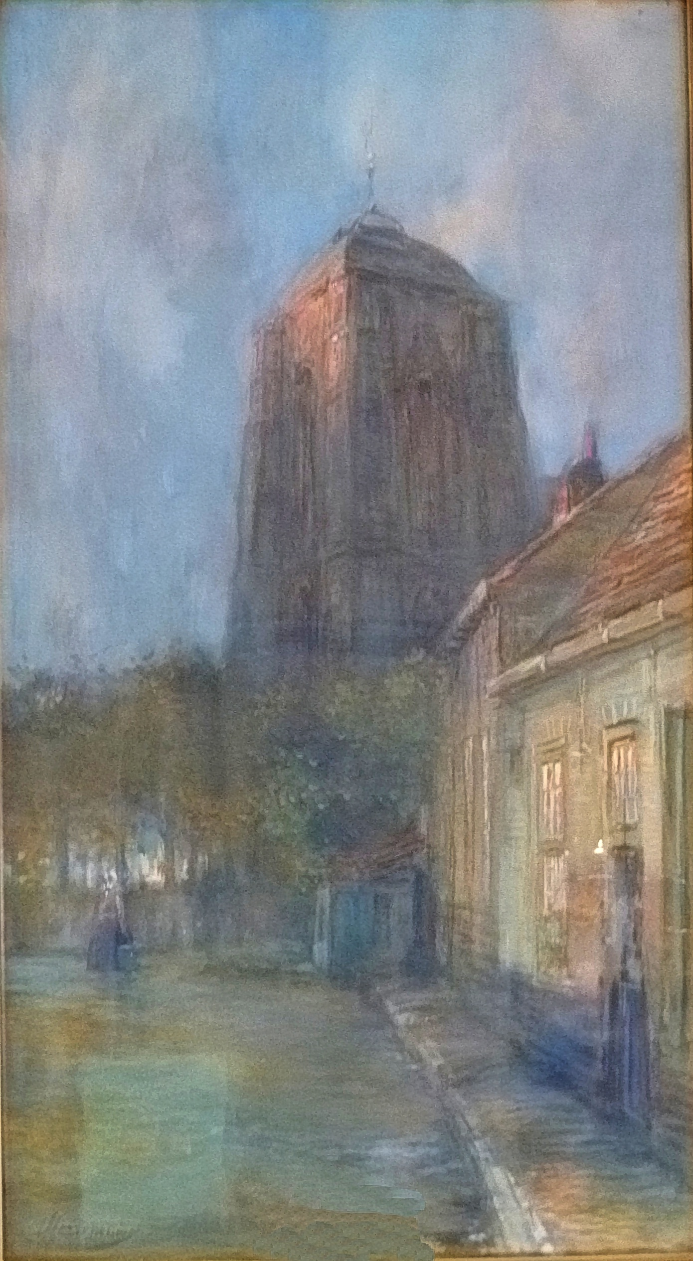 "Derniers rayons", gemengde techniek door Lievin Herremans (1858-1921); privébezit